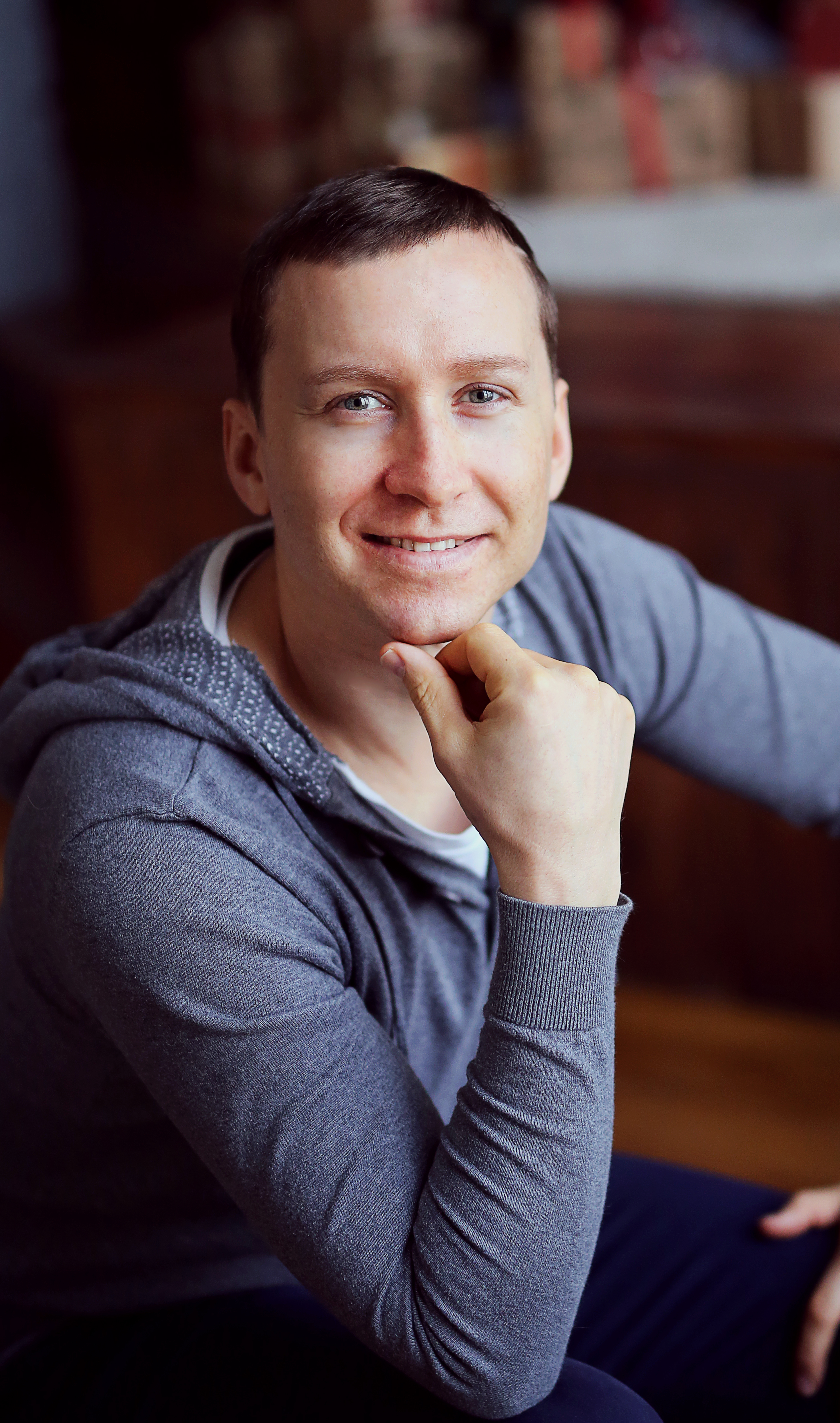 Михаил Сергеевич